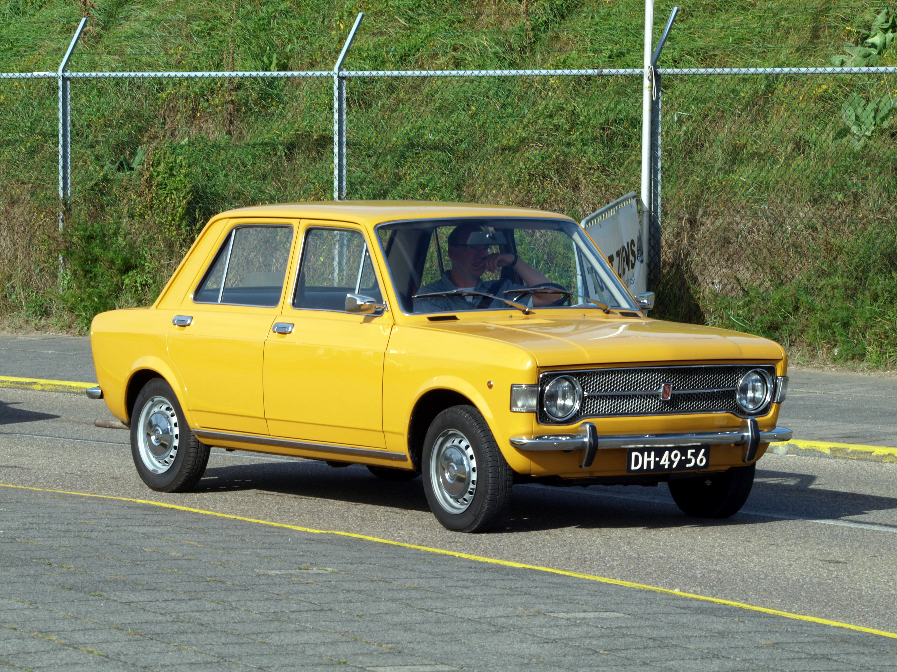 Nationaal Oldtimer Festival Zandvoort 2011.